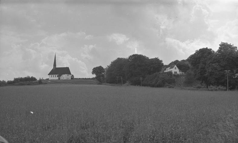 Jugendwerk Schleswig-Holstein Koppelsberg bei Plön Koppelsberg Kapelle 23. Juni - 28. Juni 1958